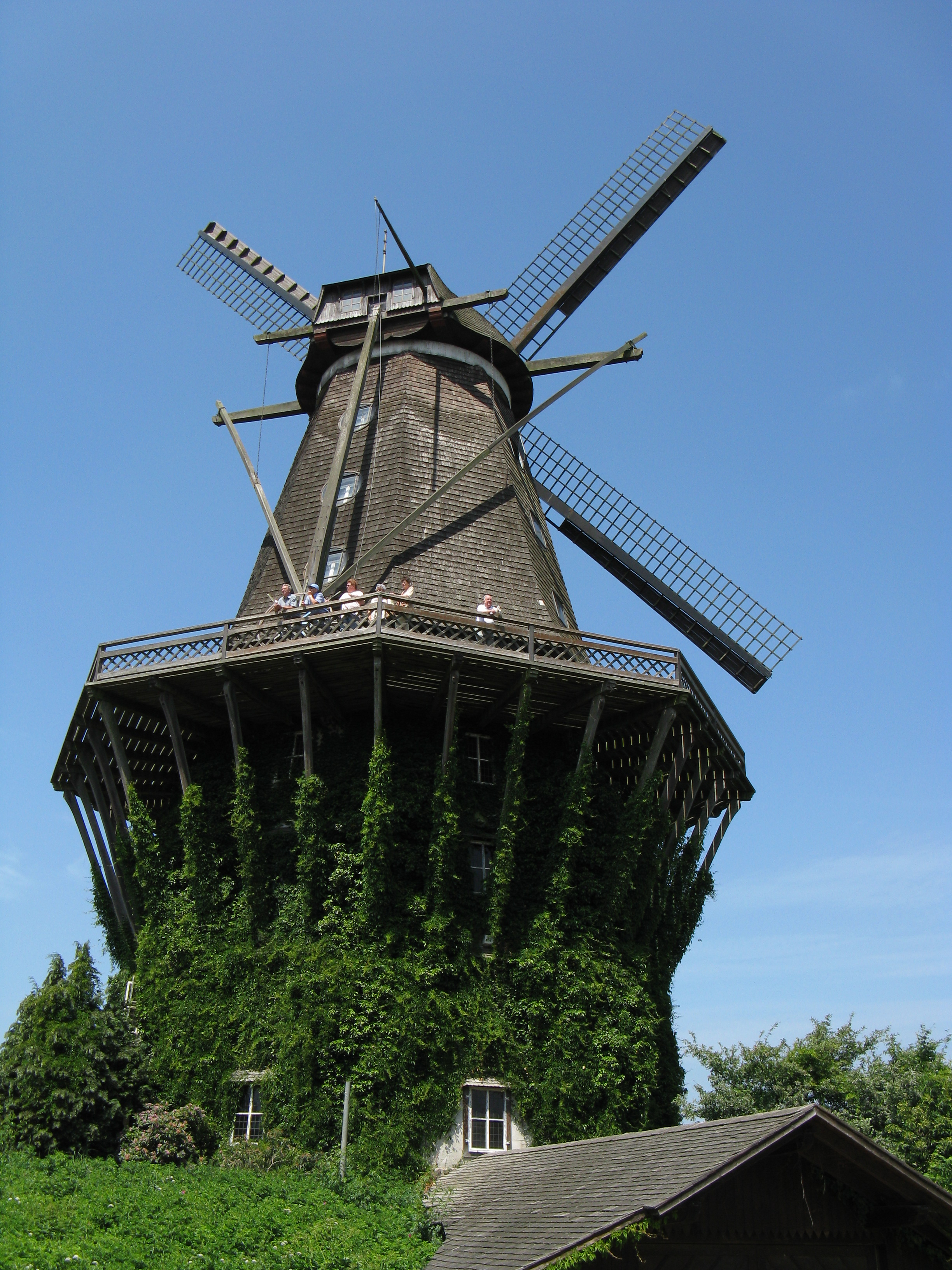 Mühlenmuseum Gifhorn: Mühle von Sanssouci (Nachbau)